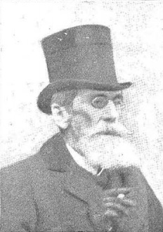 Retrato de Cayetano Sánchez Bustillo